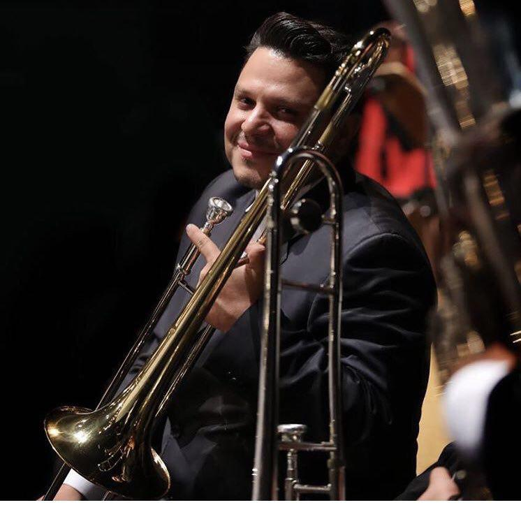 كنسرت اركستر سمفونيك تهران ١٣٩٧ با شهرداد روحاني